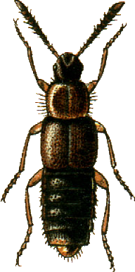 This file has been extracted from another file: Jacobs13.jpg